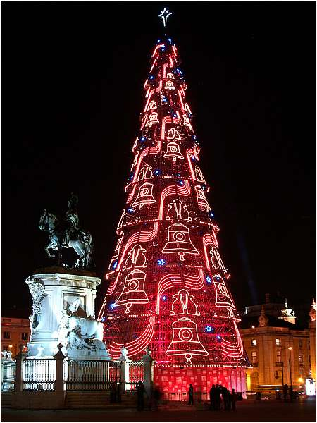 le plus grand sapin de Noël d'Europe à Lisbonne